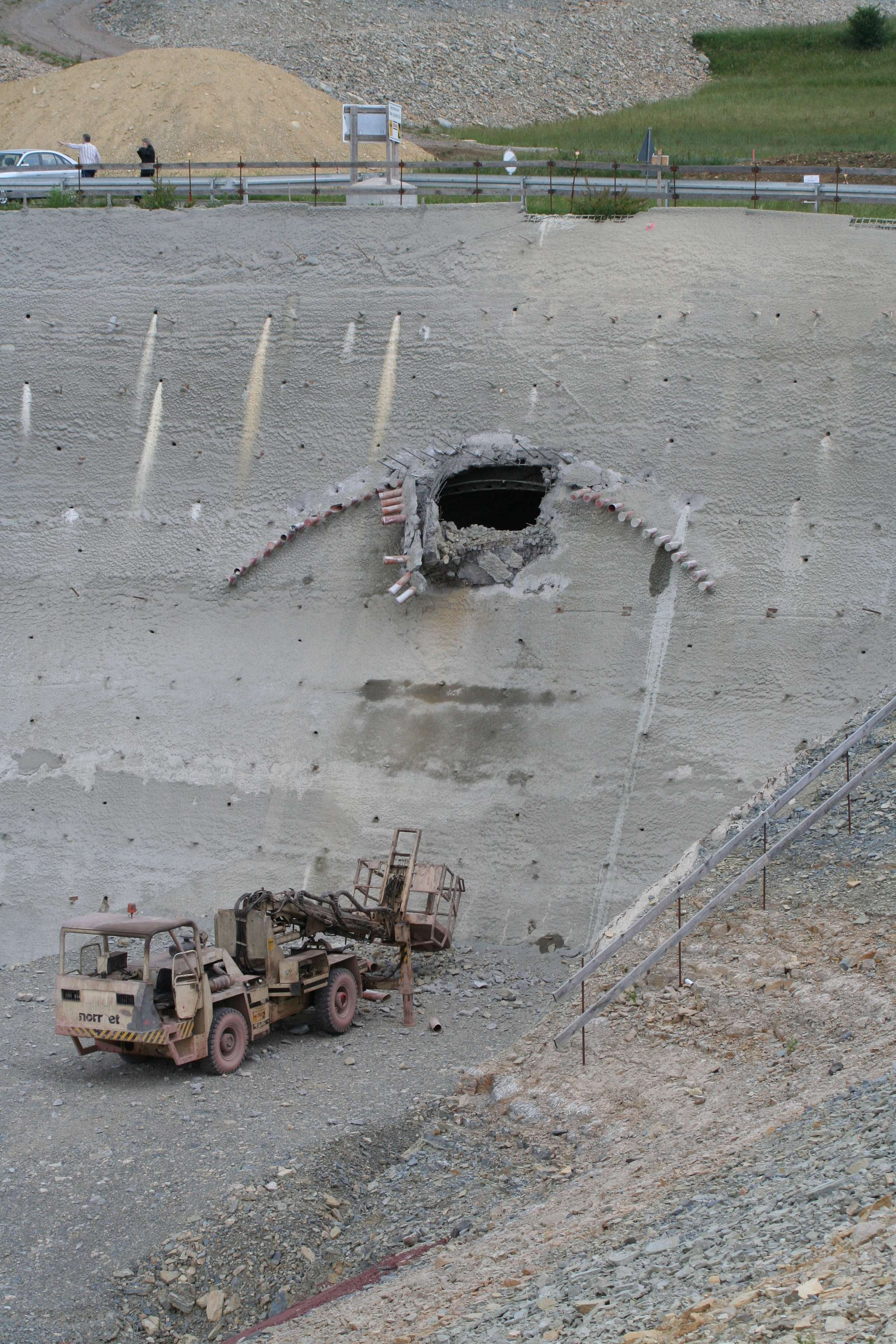 Tunnelportal Süd des Bleßbergtunnels mit Durchbruch der Kalotte